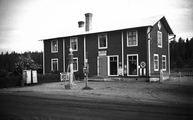 Kontantaffär i Krångfors cirka 1920-1930, brann 1965.